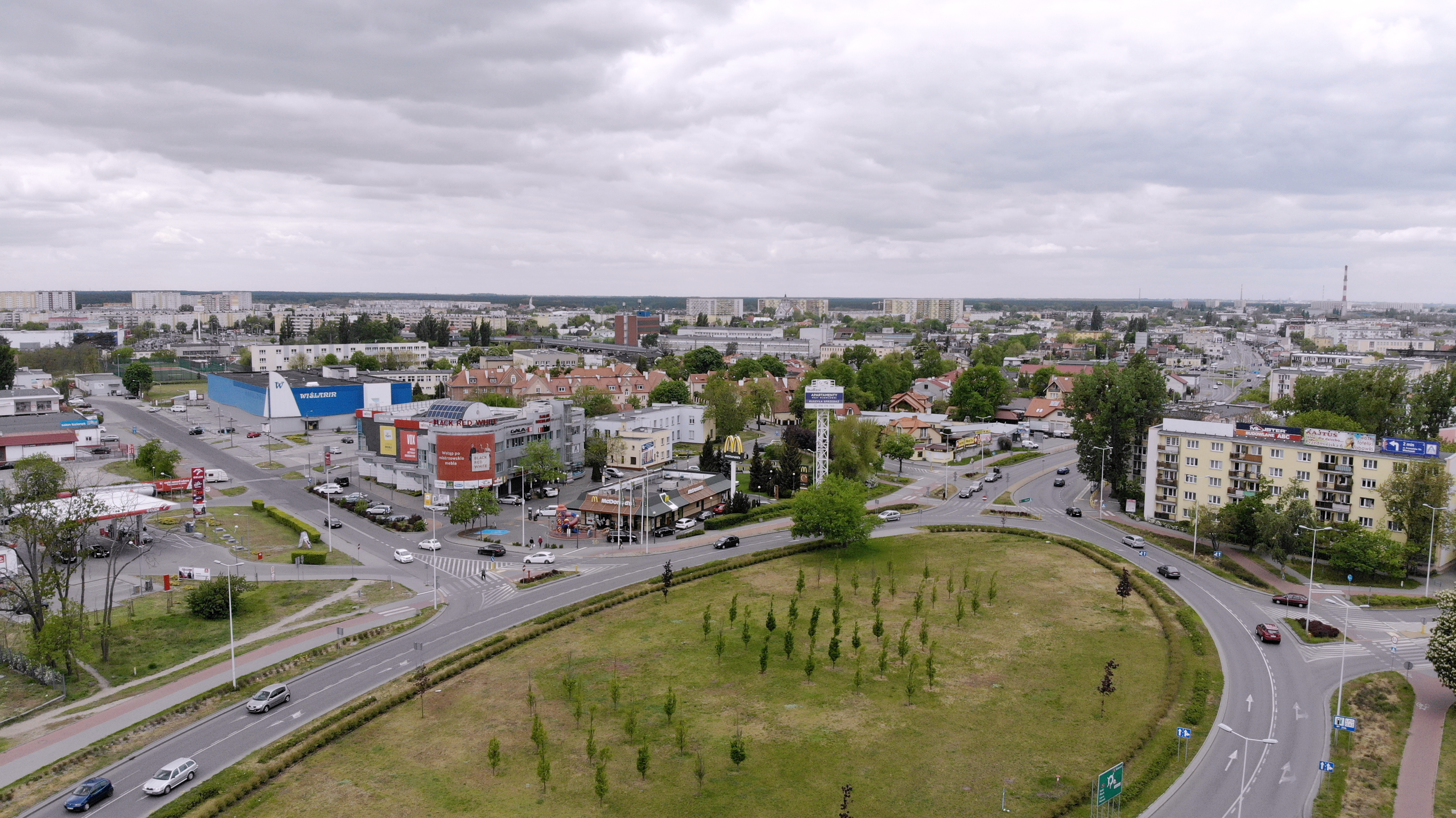 Śródmieście (2020 r.)